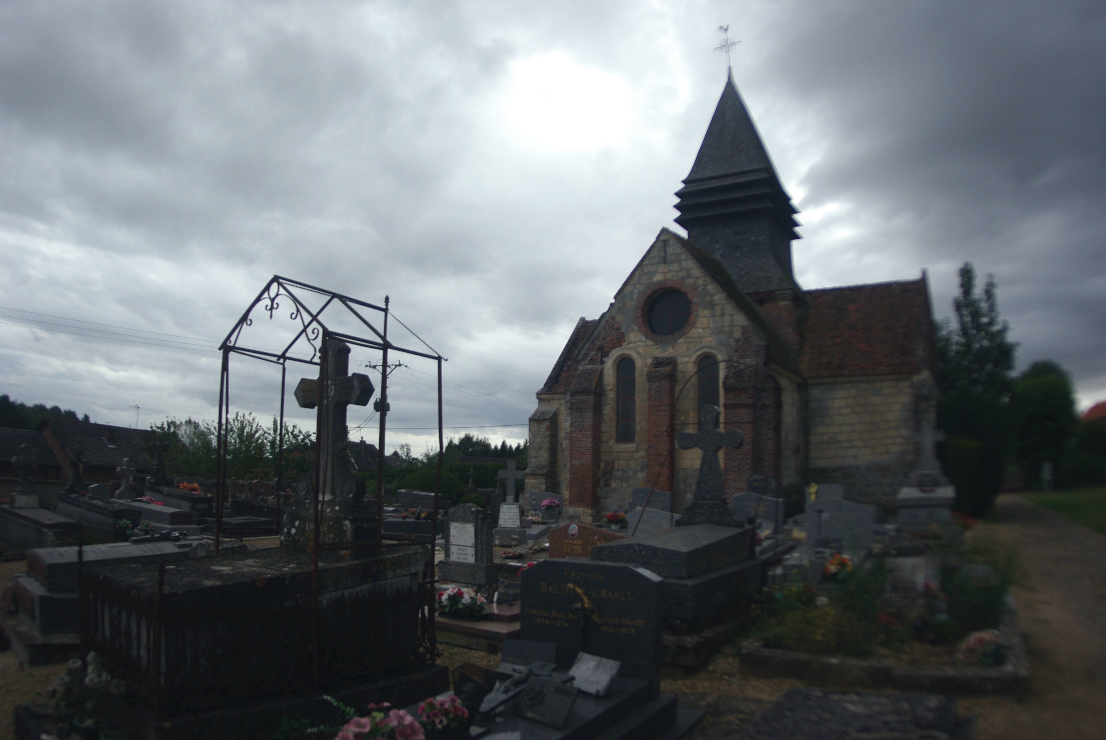 Plan en croix latine comportant une nef et deux collatéraux, un transept et un chœur à chevet plat. Seuls le chœur et le carré du transept sont voûtés d'ogives. Pratiquement toutes les baies ont été remaniées au 19e siècle. Un clocher à quatre pans couvre la croisée du transept. .